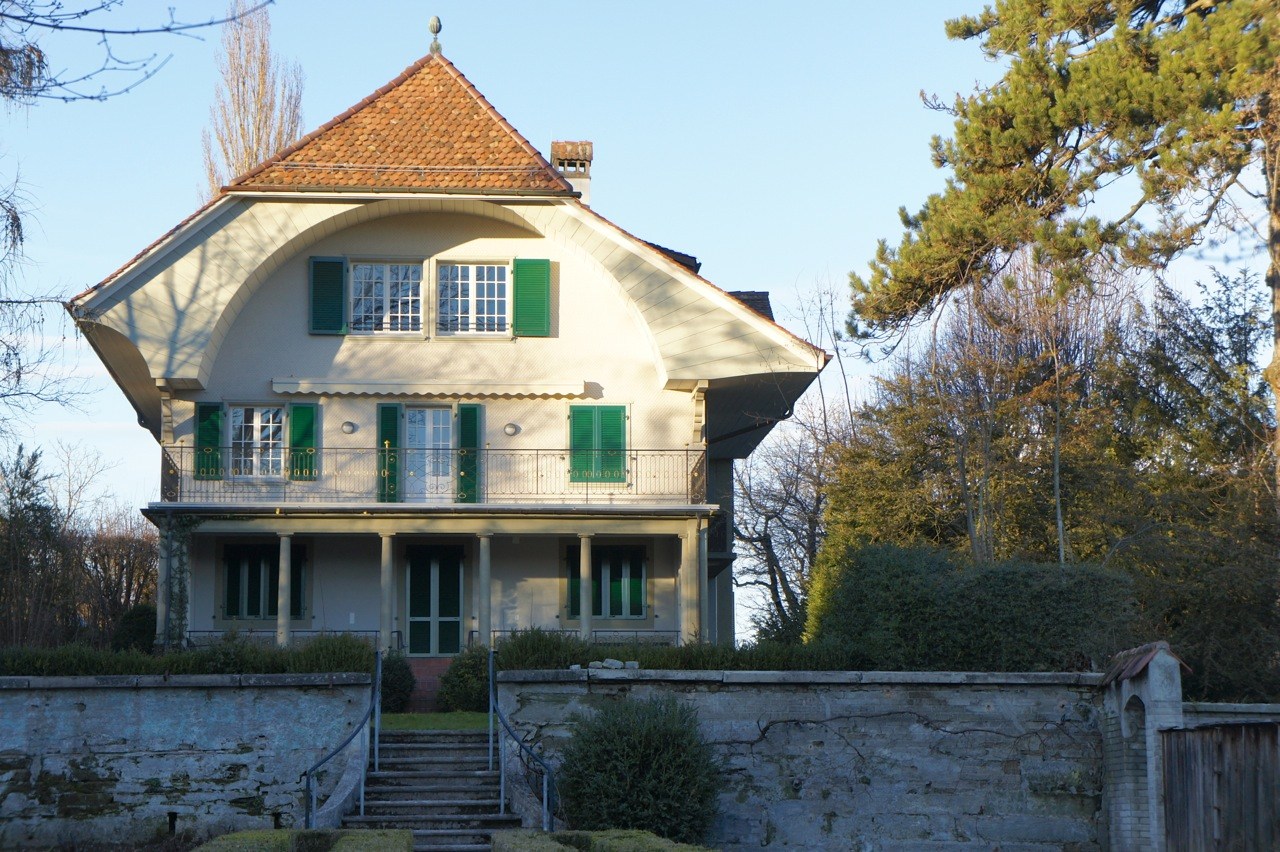 Das von Hermann Hesse gemietete Landhaus am Melchenbühlweg 26, Bern, Südseite